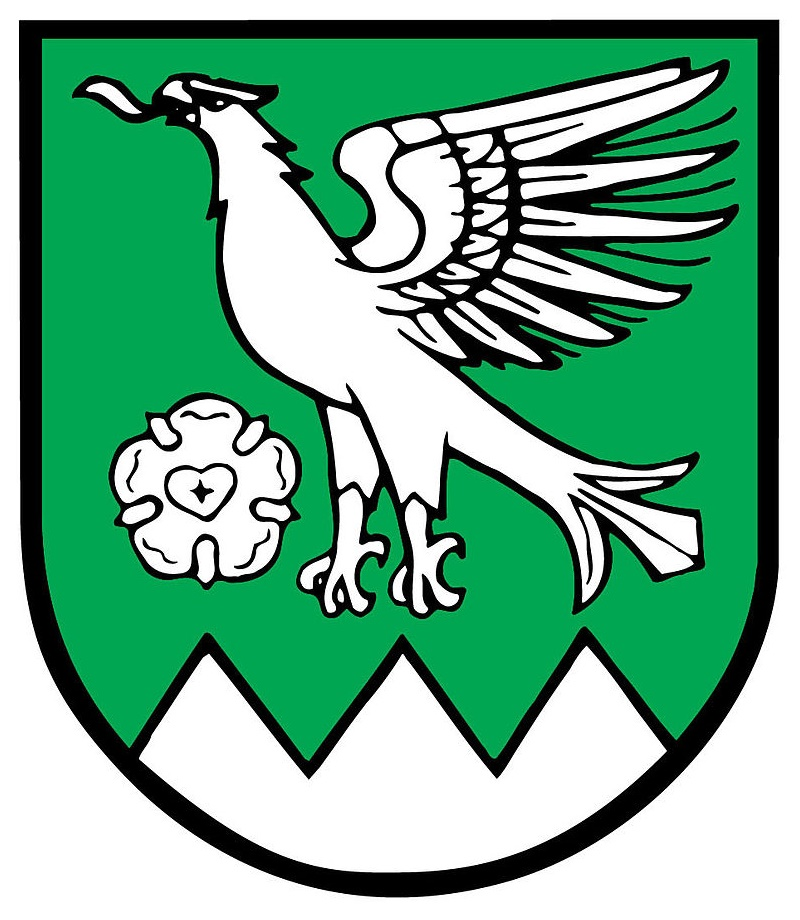 Wappen der österreichischen Gemeinde Ramsau am Dachstein, Steiermark. Wappenbeschreibung „Im grünen Schild mit einem Schildfuß von drei silbernen Spitzen ein auffliegender silberner Adler, vorne begleitet von einer silbernen Lutherrose“.[1] Die Lutherrose repräsentiert die evangelische Geschichte der Gemeinde. Die Verleihung des Gemeindewappens erfolgte mit Wirkung vom 1. November 1977.[2]